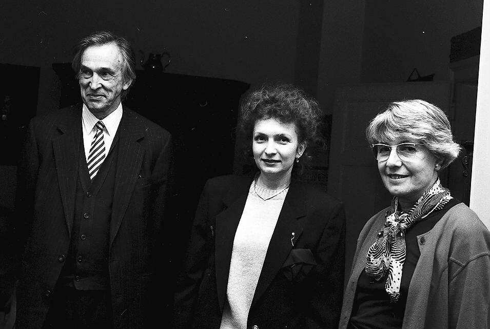 Freiburg im Breisgau: Frau Dr. Kopf empfängt den ehemaligen sowjetischen Botschafter Valentin Michailowitsch Falin